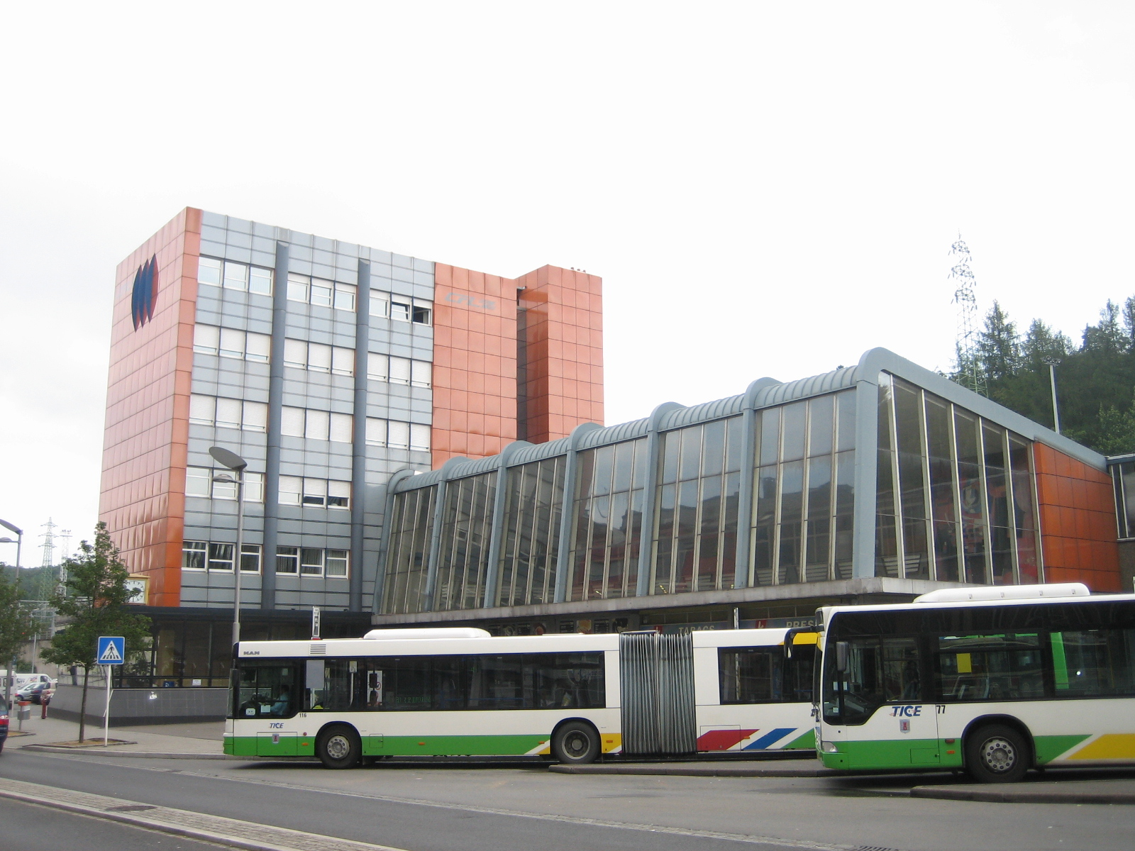 D'Gare Esch-Uelzecht, am August 2007.